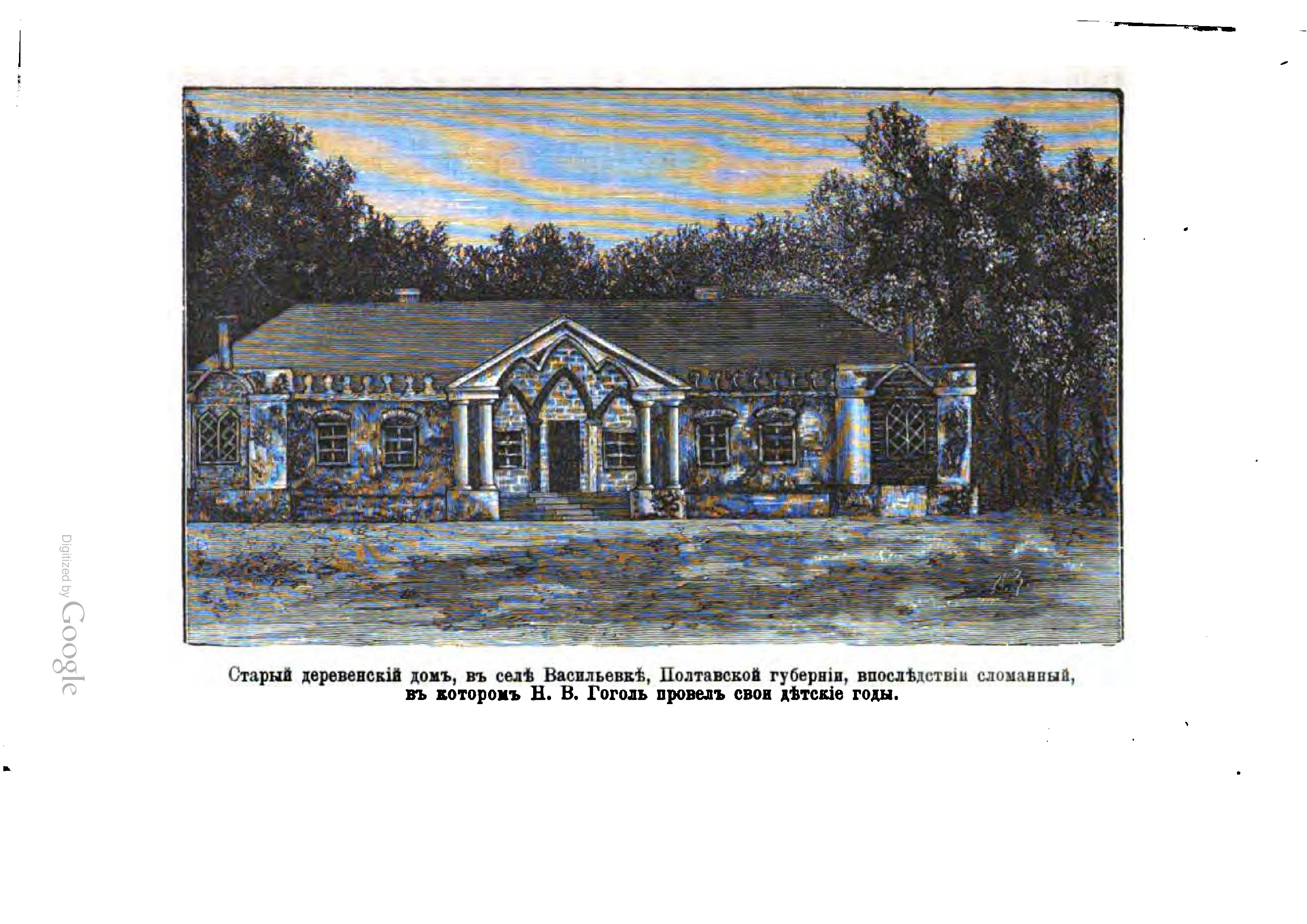 Старый деревенский дом в селе Васильевке Полтавской губернии, в котором Н. В. Гоголь провел свои детские годы.